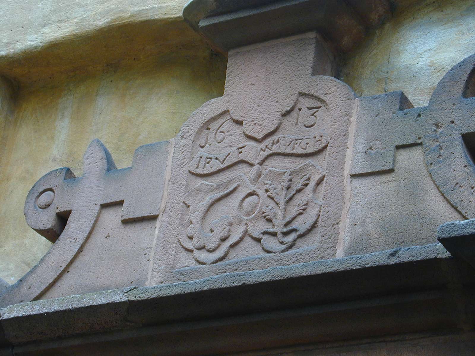 Wasserschloss Sommerau Wappen über Eingang.